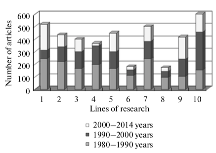 pubblicazioni